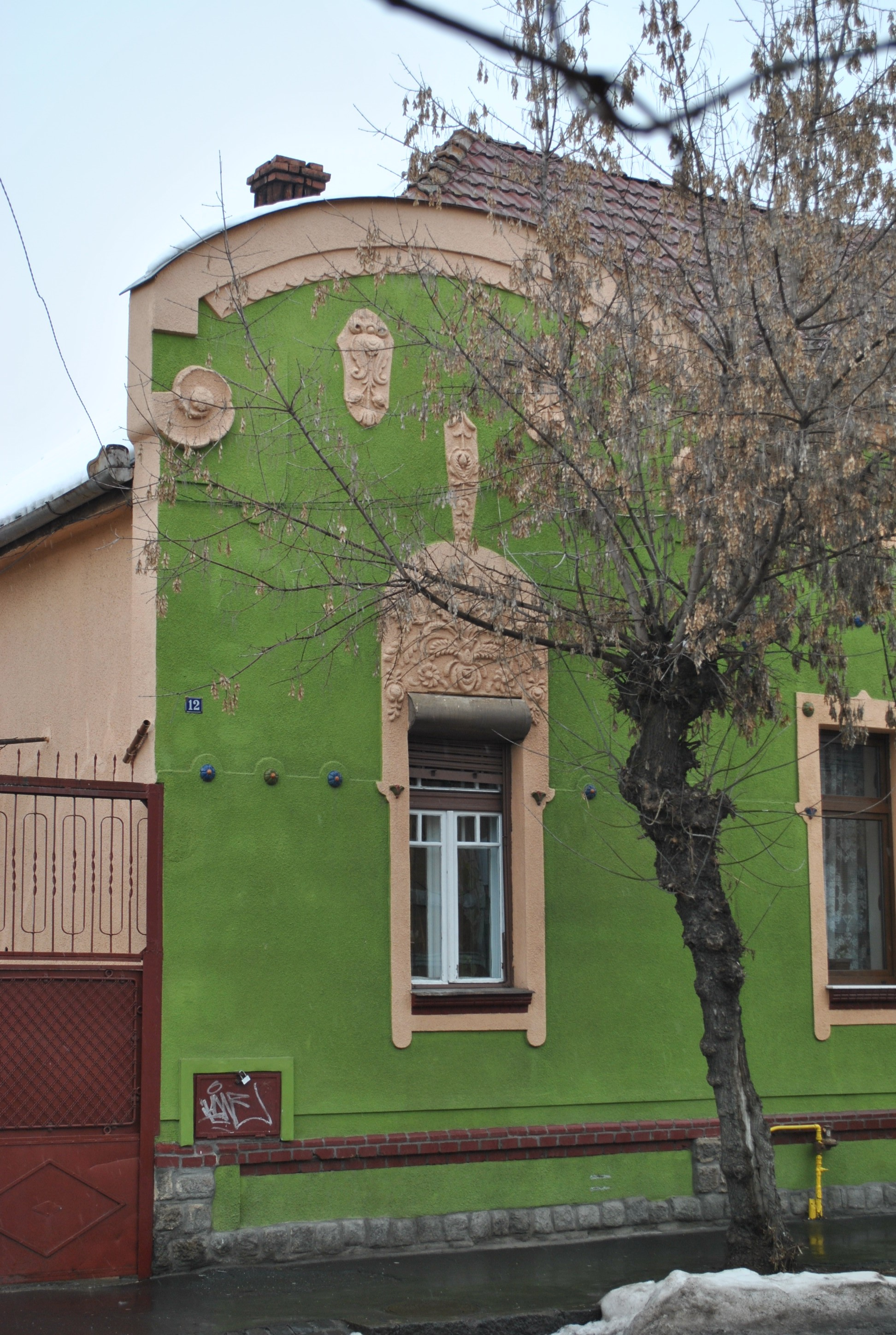 Casă, înc. sec. XX